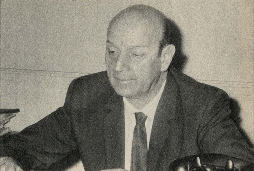 Mauricio Raúl Rettig Guissen (Temuco, 26 de mayo de 1909 - Santiago, 30 de abril de 2000), fue un político y abogado chileno.